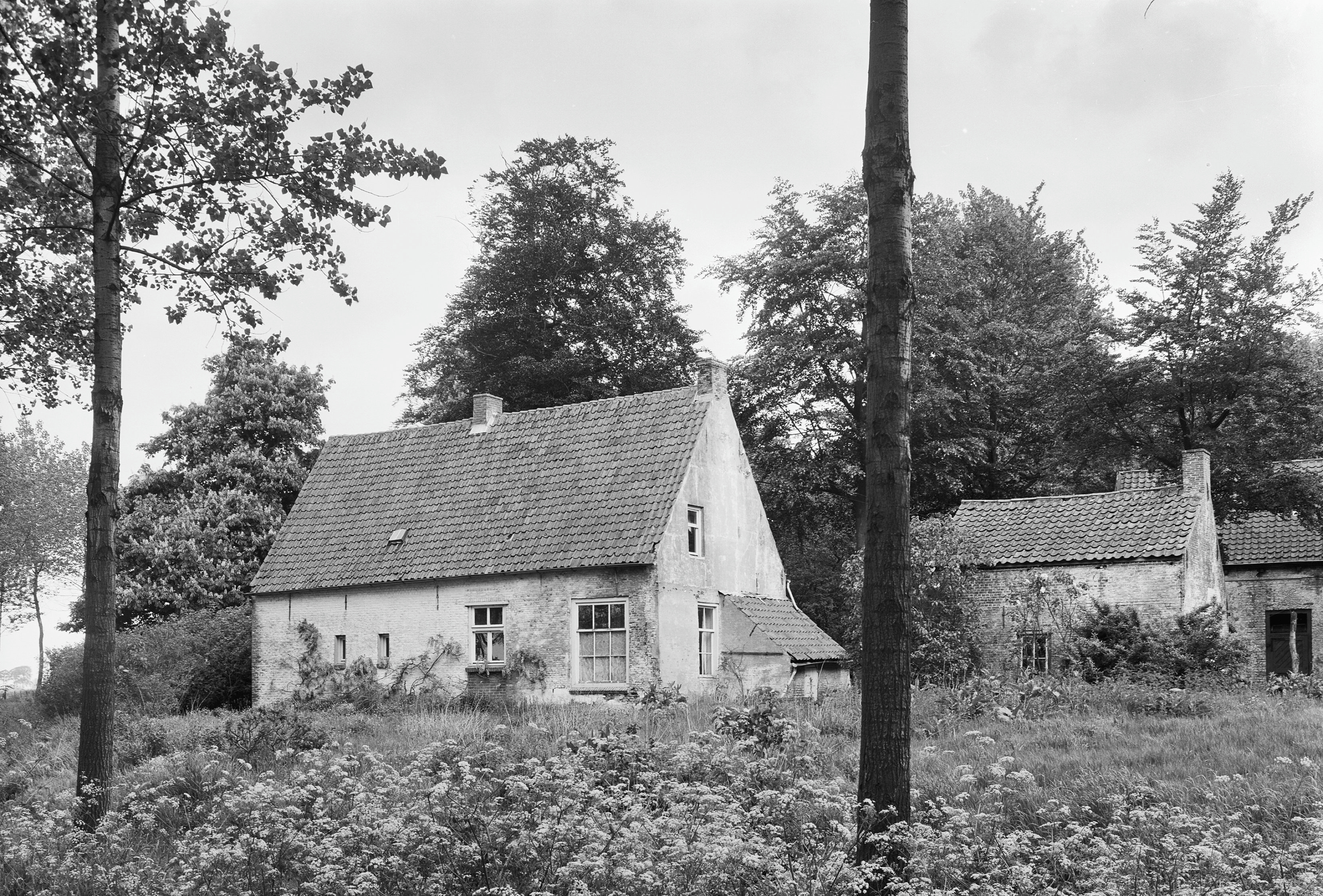 Vestingwerken: Elderschans, aanzicht